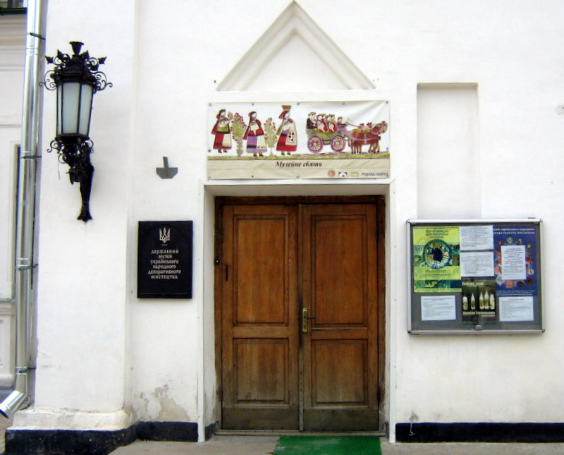 Вхід до музею декоративного мистецтва